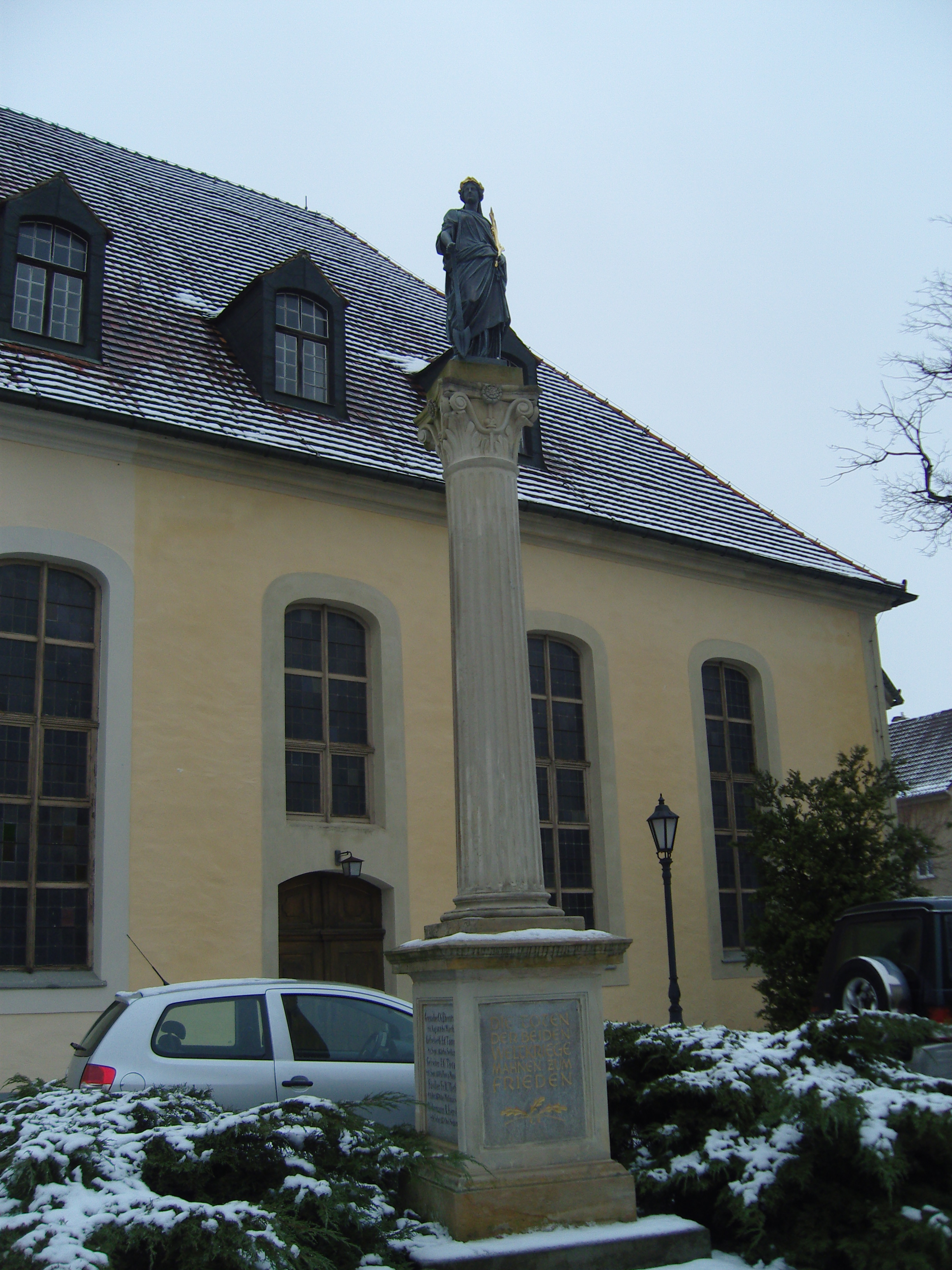 Germaniadenkmal in Ruhland (Baudenkmal); zwischen Kirchplatz und Bahnhofstraße